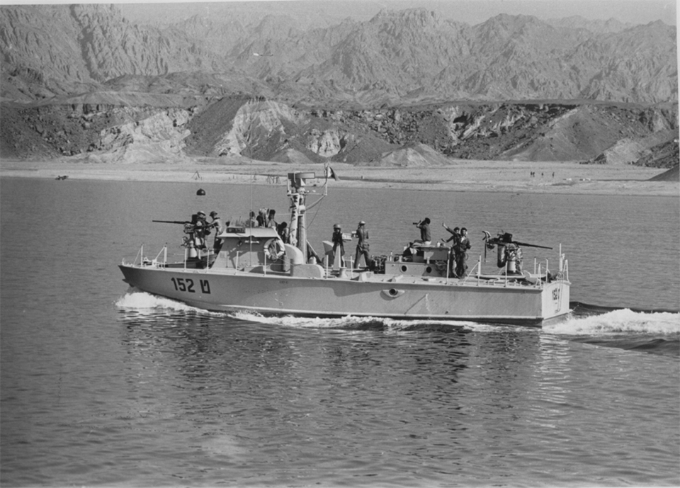 טרפדת אח"י תרשיש (ט-152) על רקע חוף סיני.